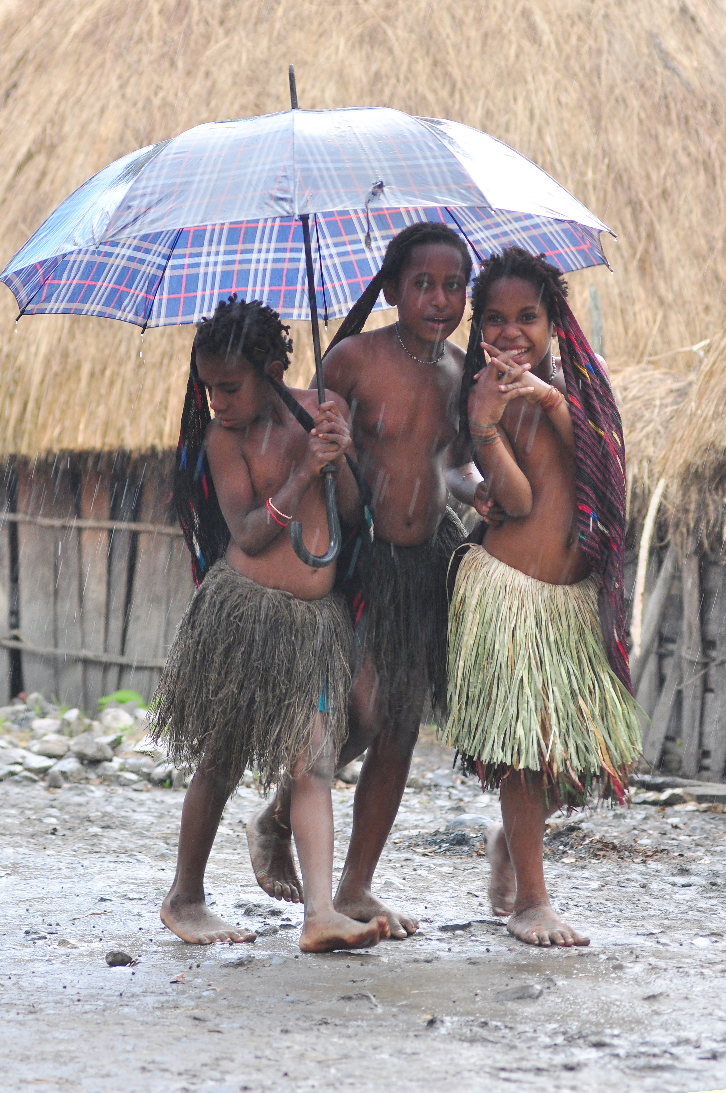 Perempuan suku Dani yang belum menikah menggunakan sali